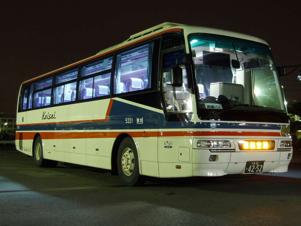 Keisei Bus 5321 Mitsubishi KC-MS829P at Kanachu Hiratsuka Branch